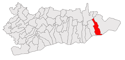 Categorie:Hărţi ale judeţului Călăraşi